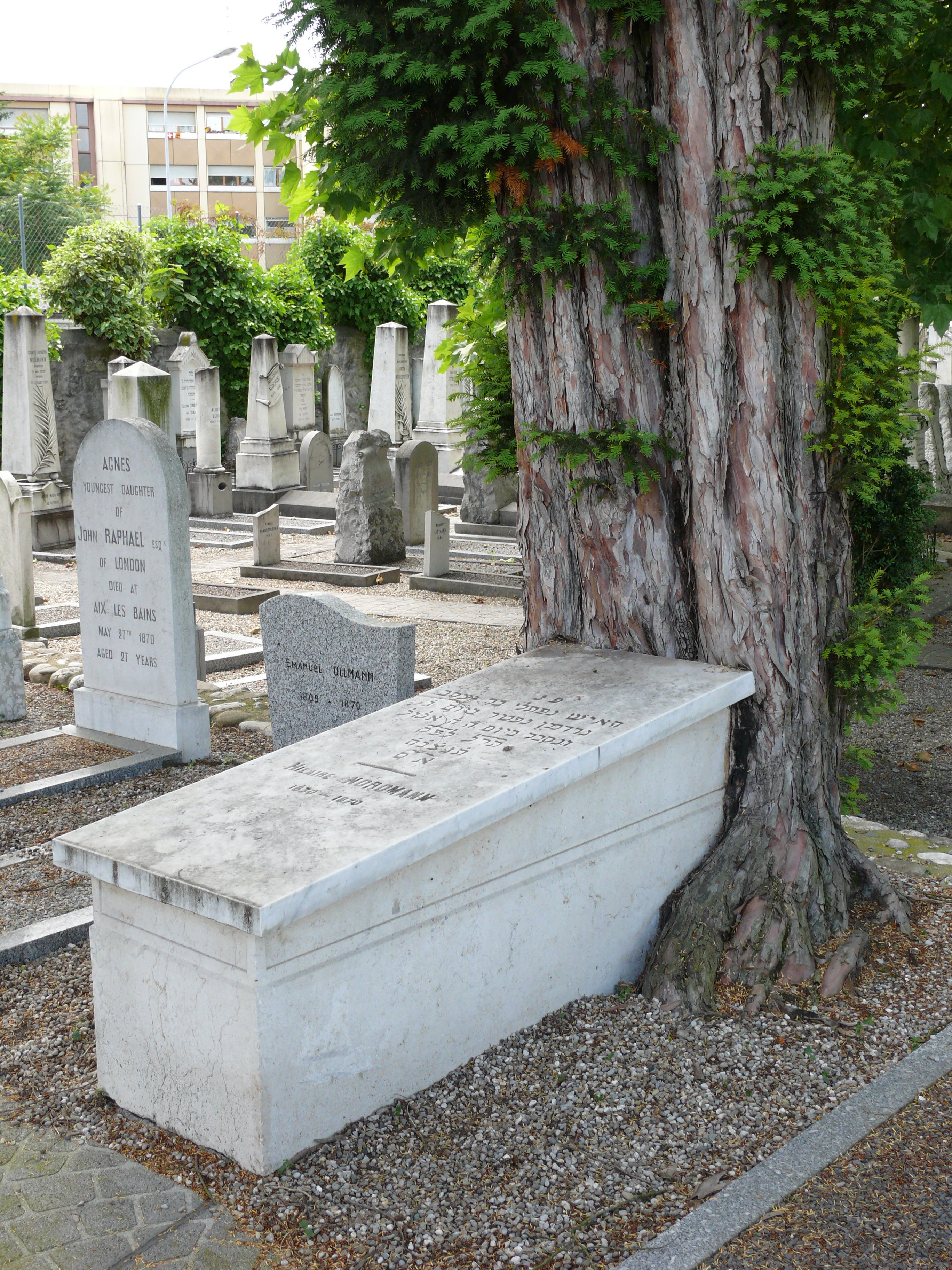 Détail d'une tombe du cimetière juif de Carouge, parcelle de 1852. Le tombeau et l'if, qui a poussé autour, semblent unis pour la vie.